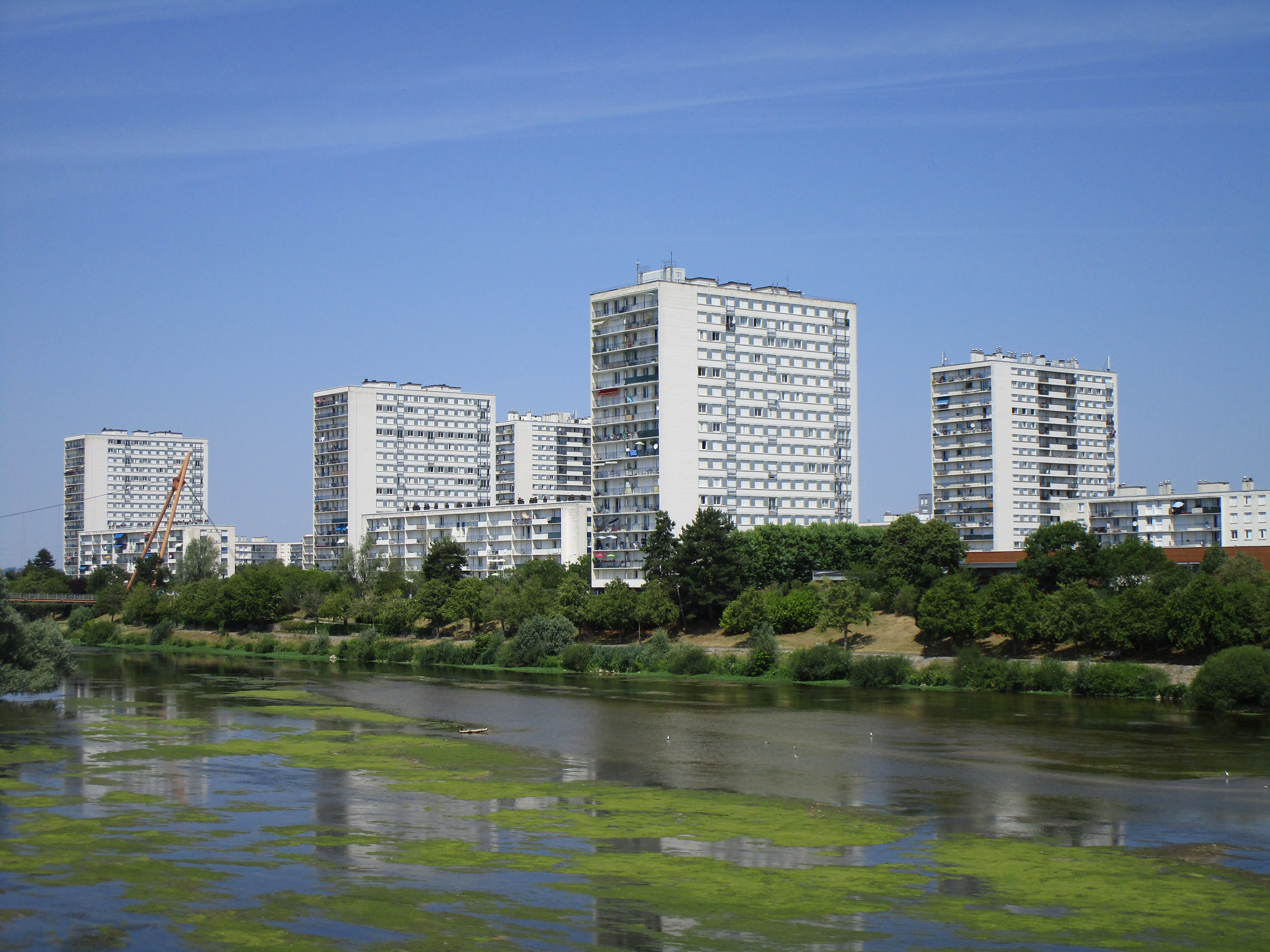 Le quartier des Rives du Cher de Tours, vu depuis le pont de Vendée.